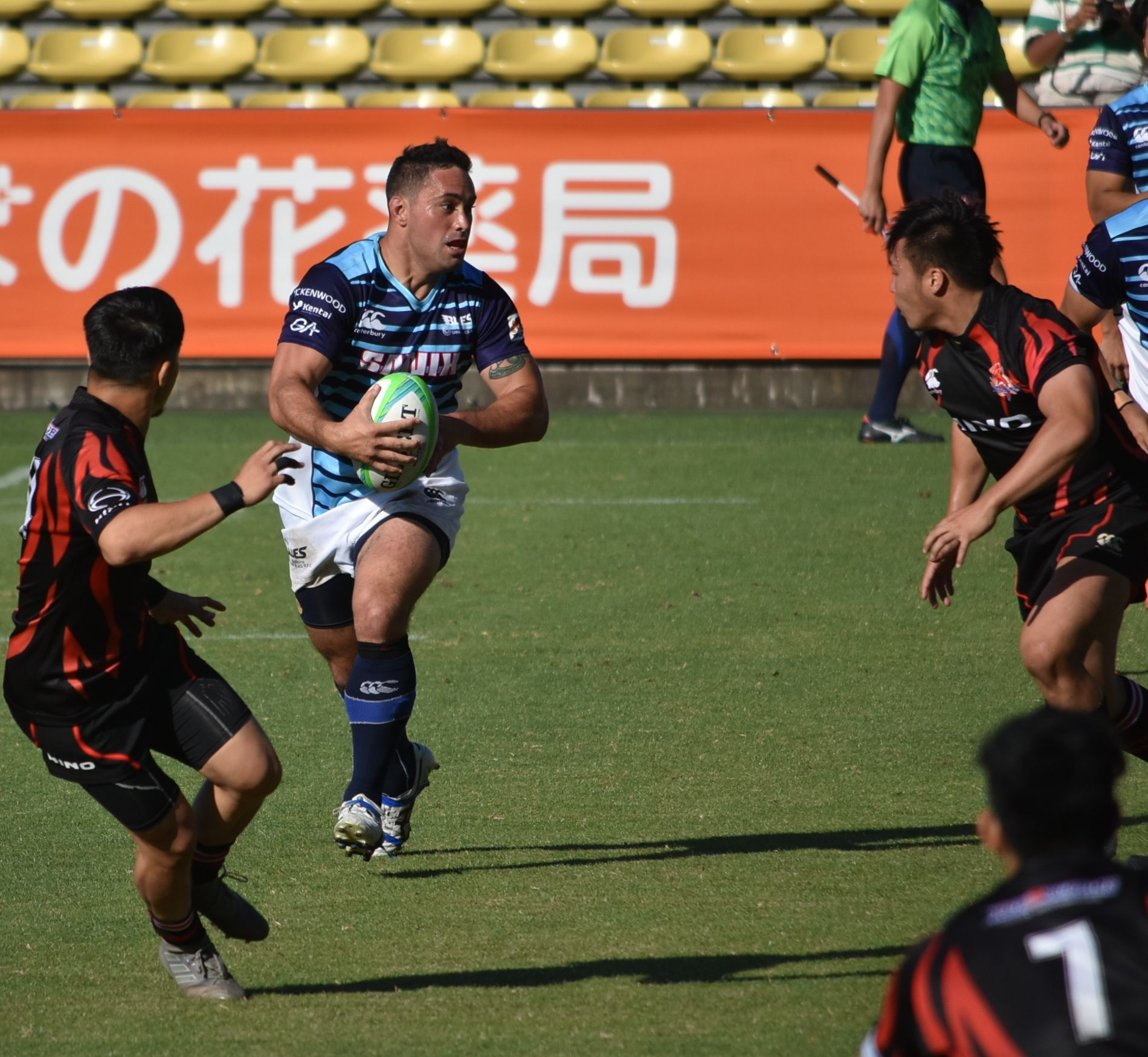 カーン・ヘルケス